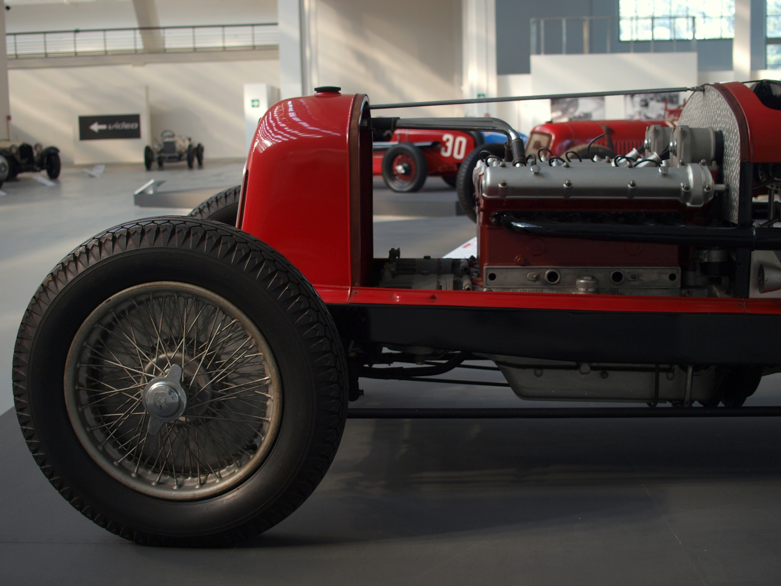 L'evoluzione dell'automobile